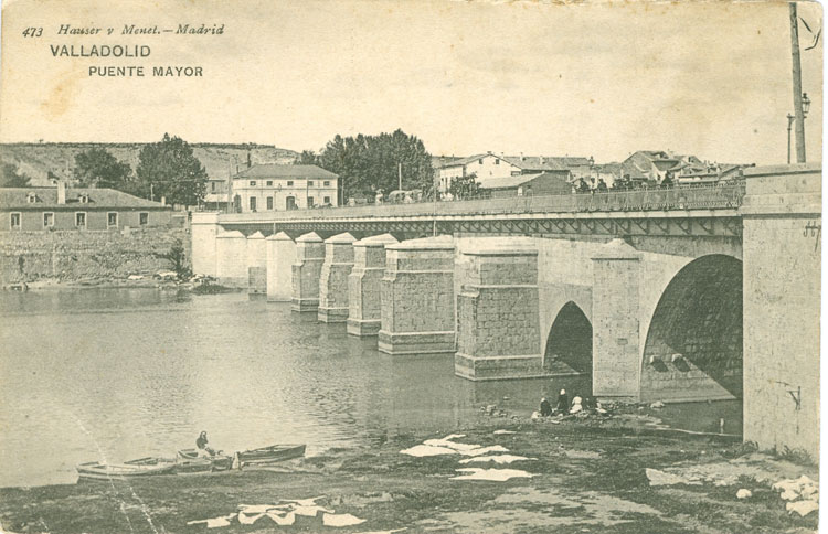 Puente Mayor - Valladolid - Postal Color